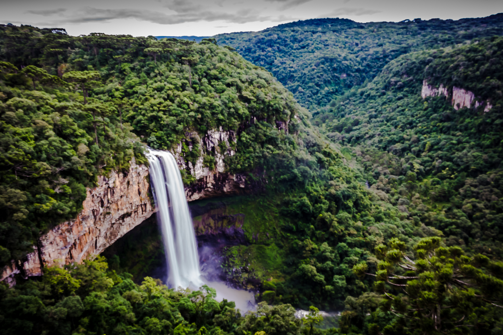 Cascata Caracol